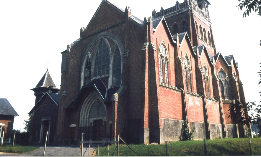 façade principale de l'église de Montescourt-Lizerolles